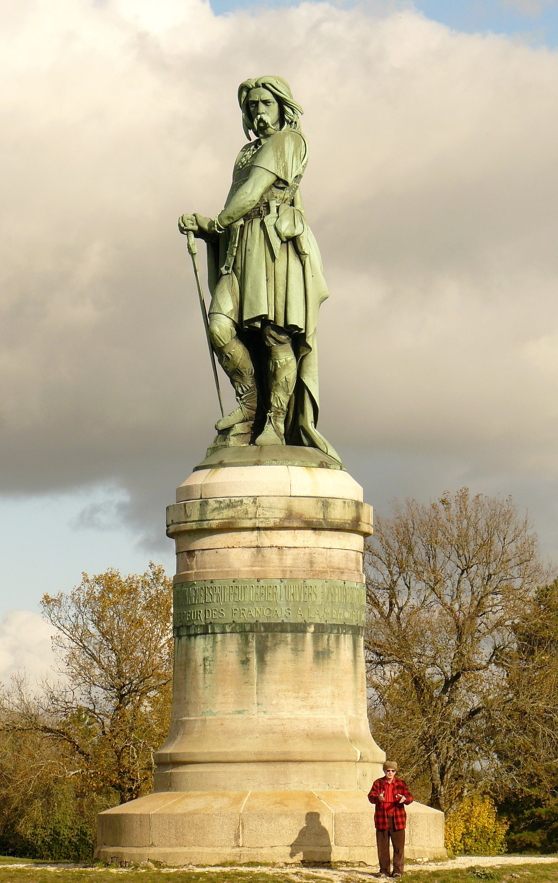 Alise-Sainte-Reine (Côte-d'Or) France - Site d'Alésia, Mont Auxois - Statue de Vercingétorix - sculpteur Aimé Millet